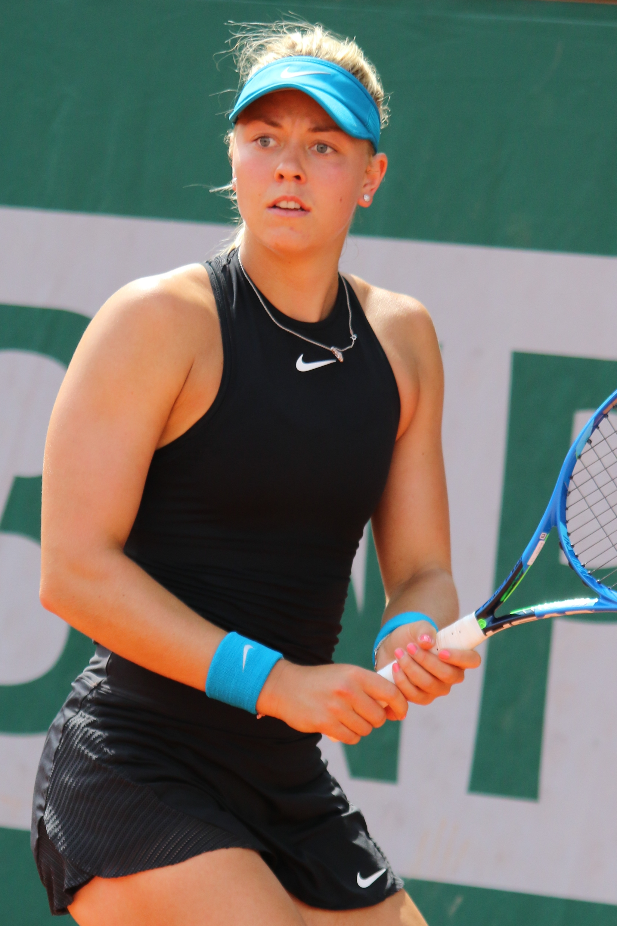 Witthoeft RG18 (12)